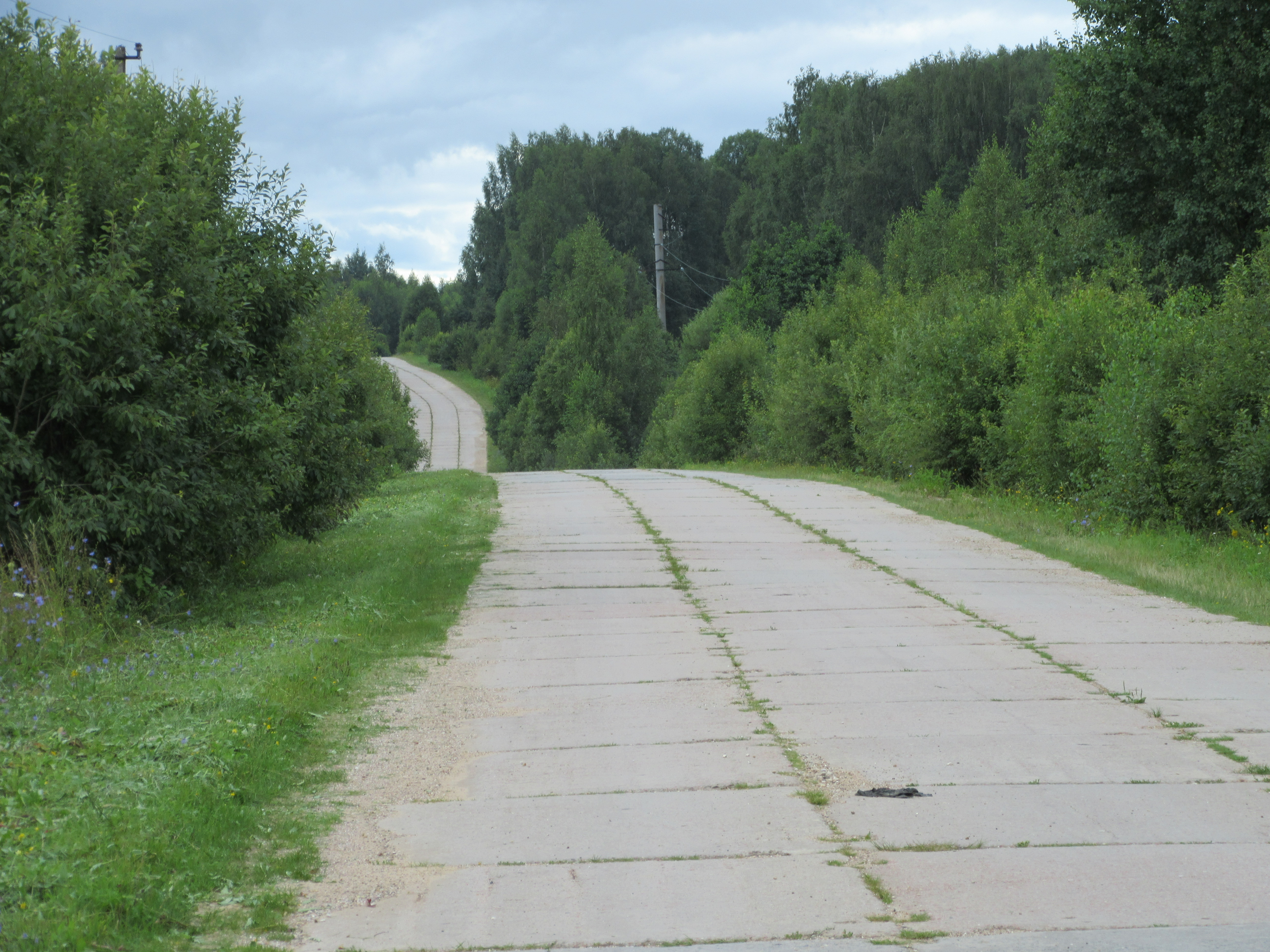 Дорога Износки-Шанский завод